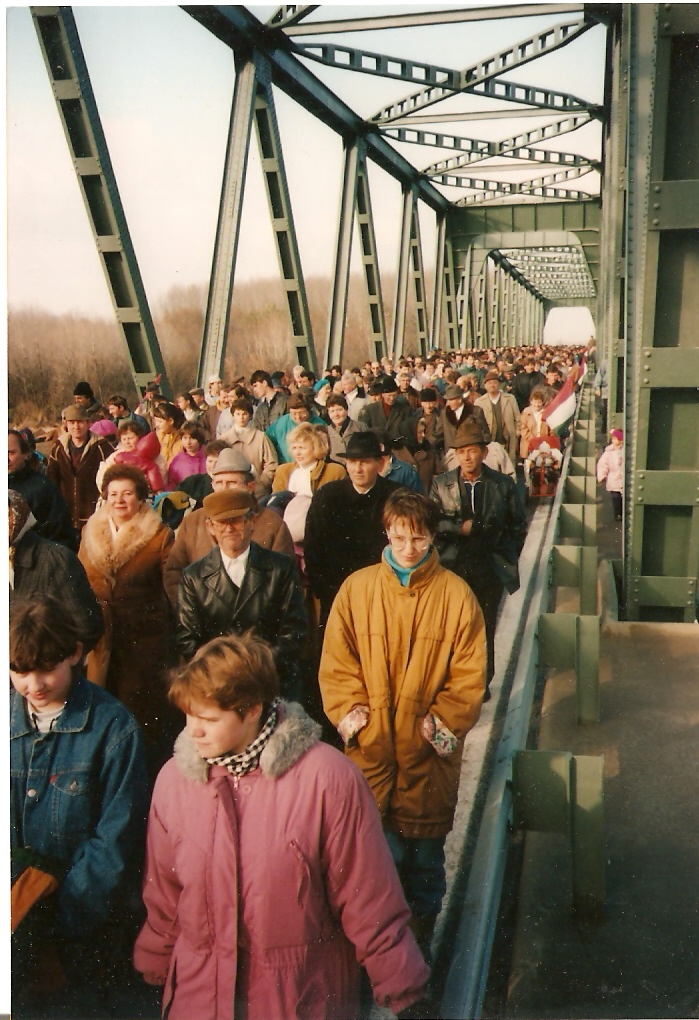 A kép a cigándi Tisza-híd ünnepélyes felavatásán készült